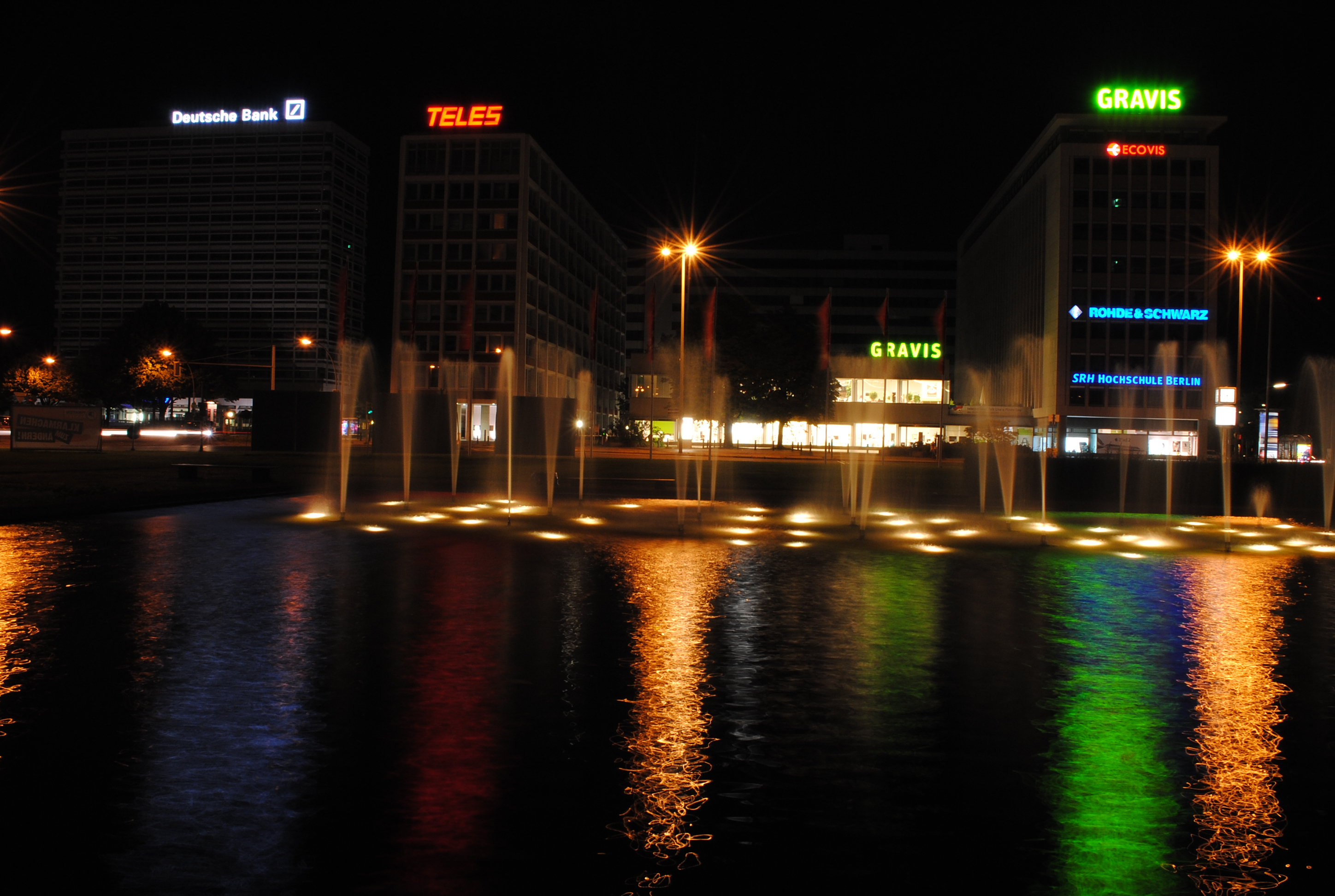 Zu sehen sind die Gebäude Ernst-Reuter-Platz 8, Osram-Haus, Bürohaus, 1956-57 von Bernhard Hermkes (Denkmalnummer 09020532) und Ernst-Reuter-Platz 9-10, Büro- und Geschäftshaus (Fa. Pepper), 1960-62, 1963 von Sobotka & Müller. (09020532)